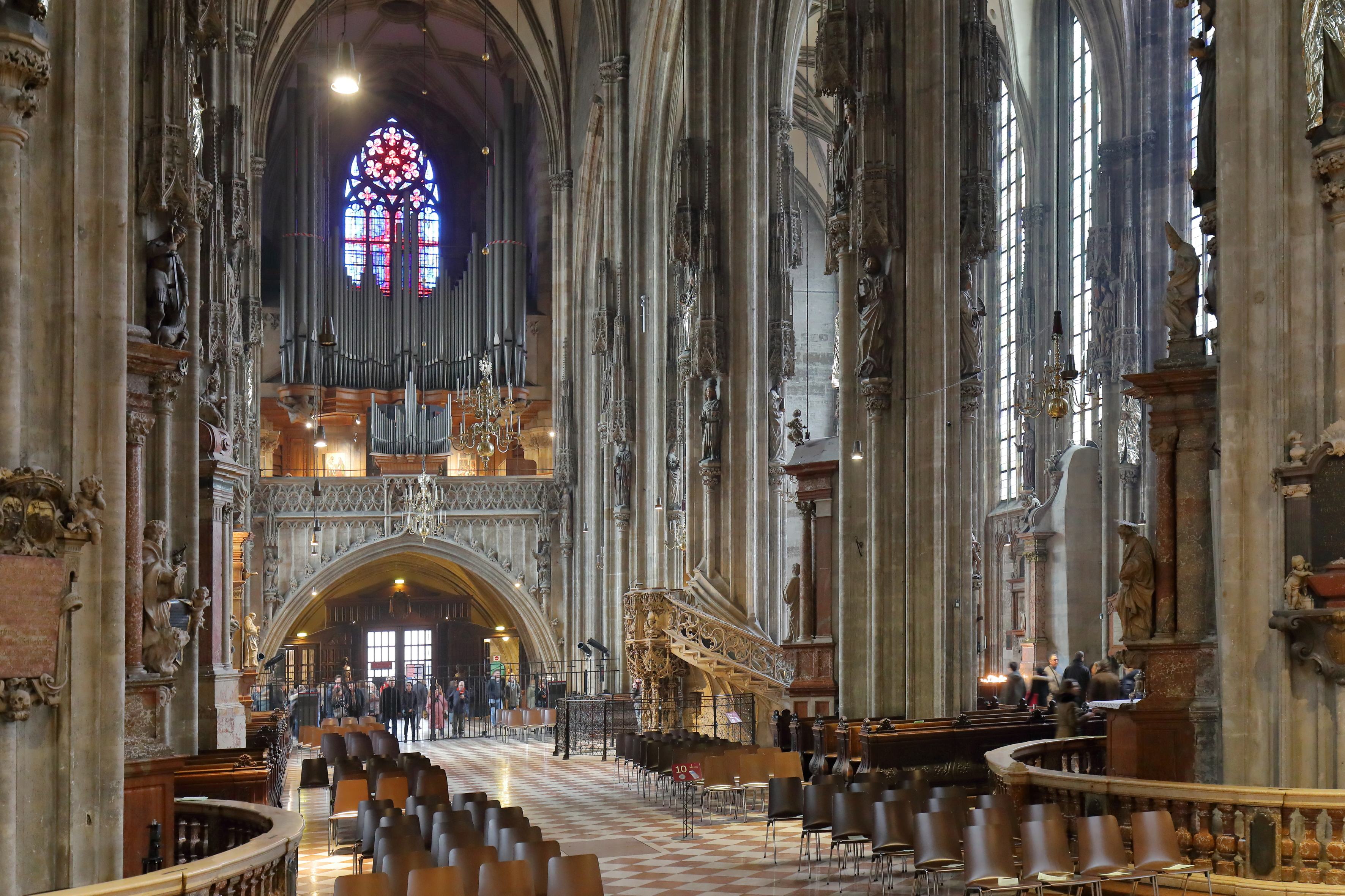 Innenansicht Richtung Empore des Stephansdoms in der österreichischen Bundeshauptstadt Wien.Das gotische dreischiffige Langhaus wurde über einer Vorgängerkirche im 15. Jahrhundert errichtet. Die Orgel auf der Westempore mit vier Manuale, etwa 125 Register und rund 10.000 Pfeifen wurde von 1956 bis 1960 durch die Orgelbaufirma Johann M. Kauffmann angefertigt. Die Kanzel ist ein Meisterwerk der spätgotischen Plastik aus Breitenbrunner Kalksandstein und wurde Anfang des 16. Jahrhunderts realisiert.